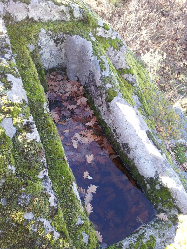 Tumba visigoda en Santibáñez de la Sierra (España)